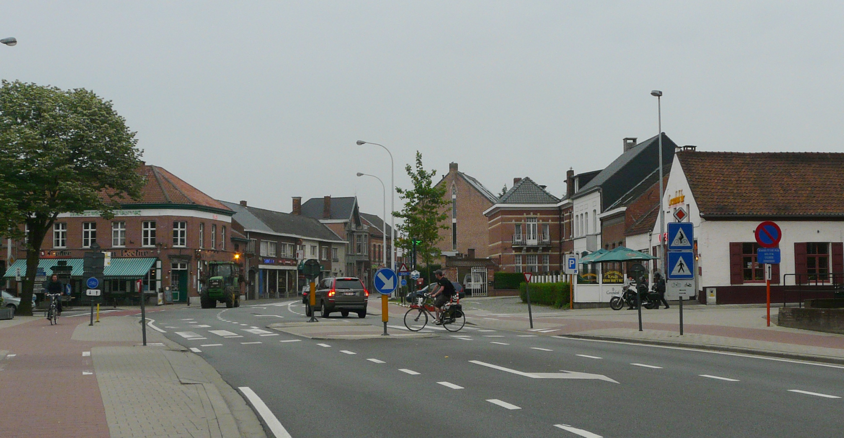 Straat in Kasterlee